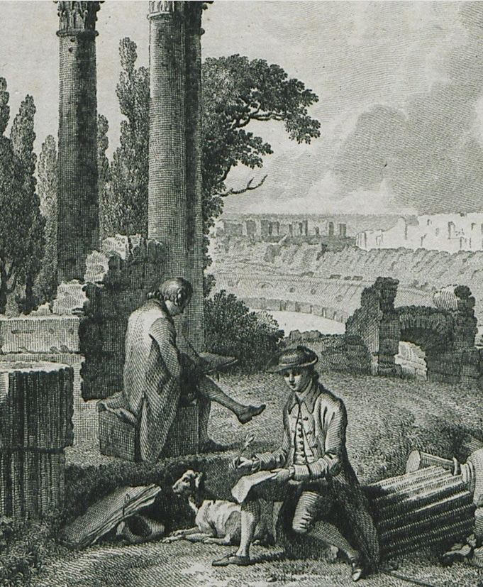 P.-A. Guys - "J'écris, tandis que mon compagnon dessine" (frontispice)